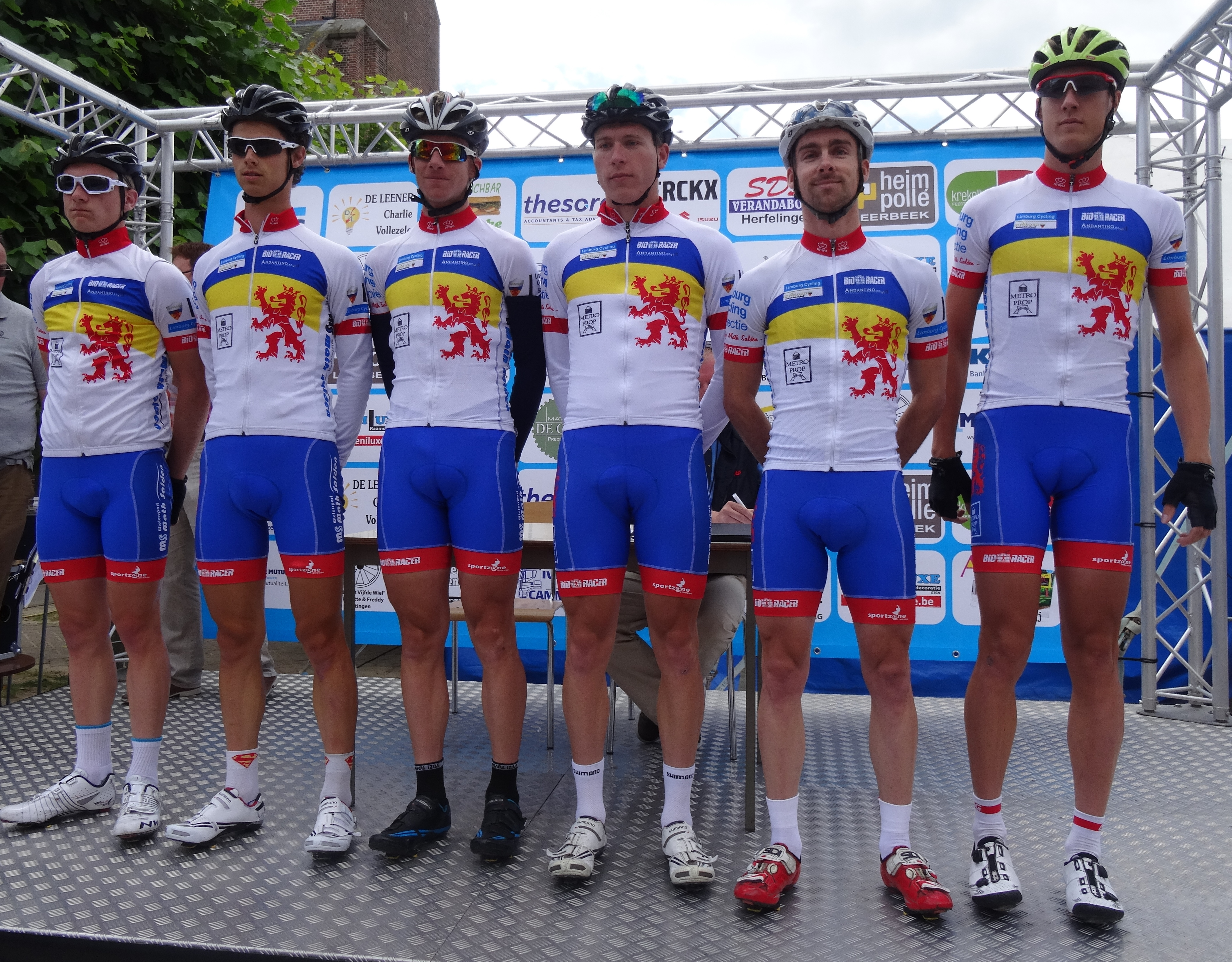 Reportage photographique réalisé le mercredi 25 juin à l'occasion du départ et de l'arrivée de l'Internationale Wielertrofee Jong Maar Moedig 2014 à Oetingen (Gooik), Belgique.